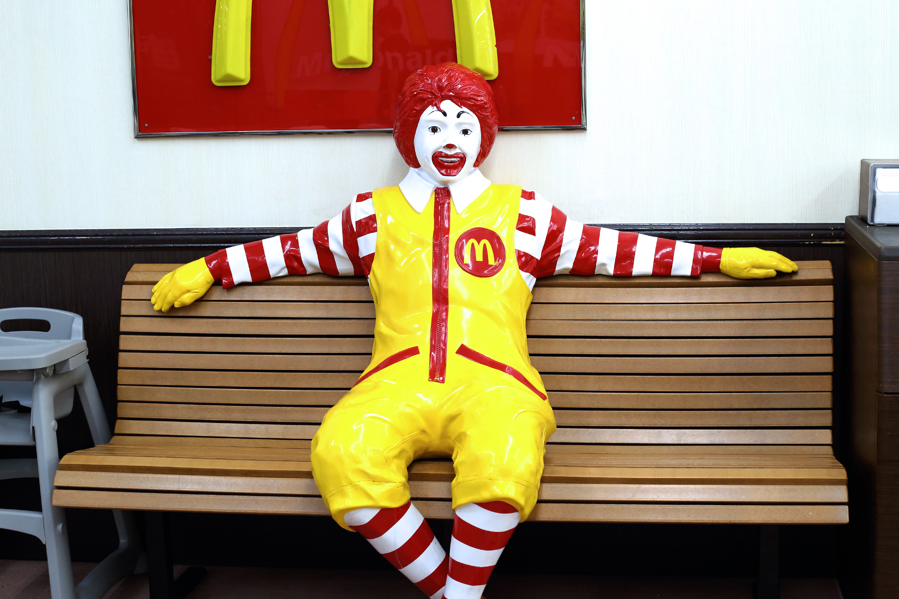 ドナルド・マクドナルドのオブジェ（修正あり）